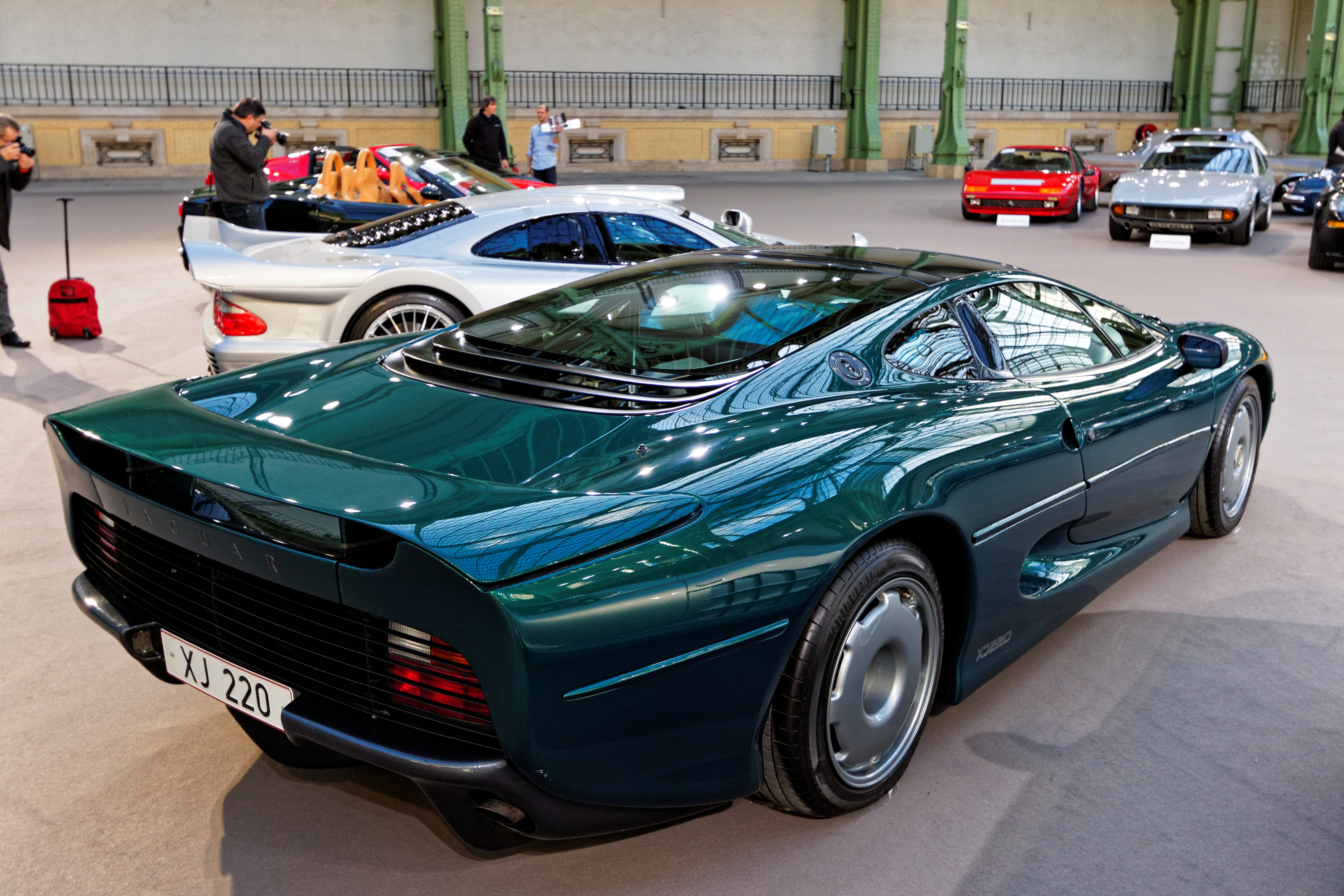 Un des véhicules présenté lors de la vente aux enchères Bonhams 2016 au Grand Palais de Paris.